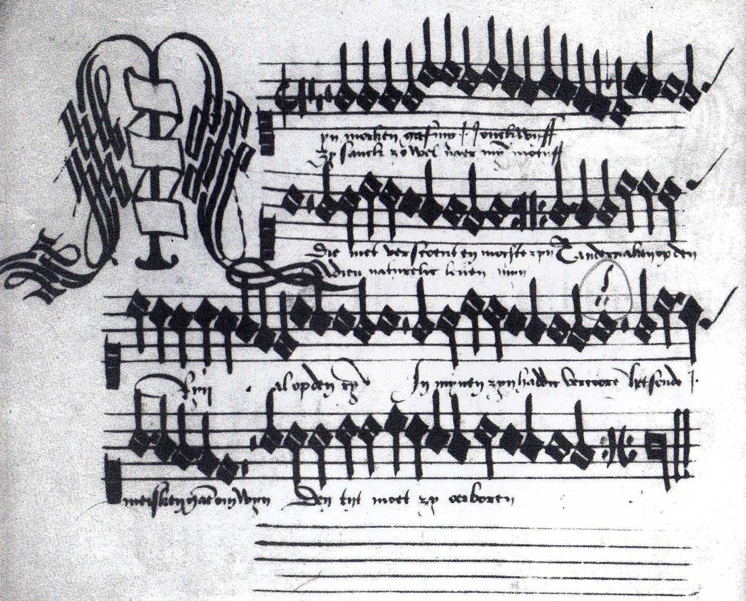 Het quodlibet "Mijn morken gaf mij een jonck wijff" uit het liedboek van Hieronymus Lauweryn van Watervliet (ca. 1505).